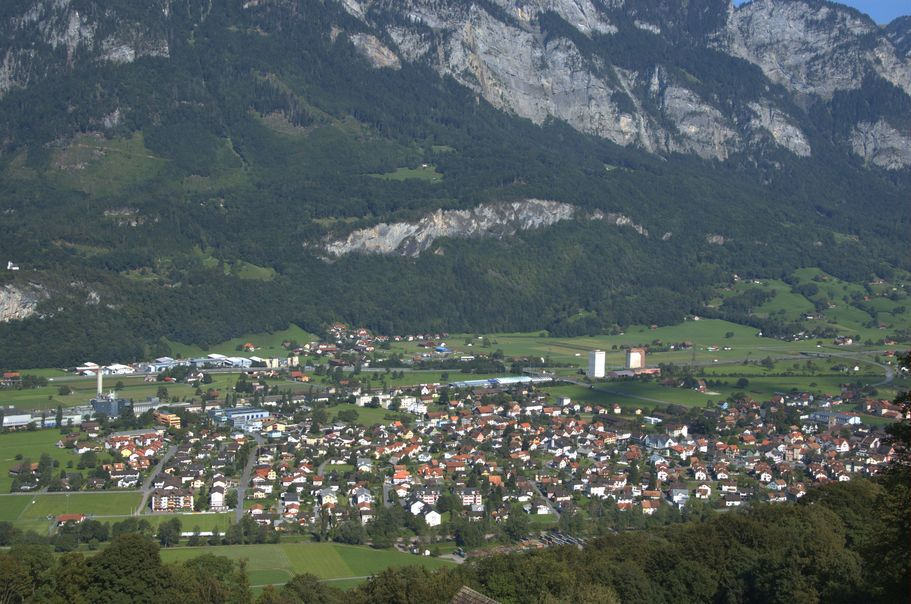 Flums Richtung Osten